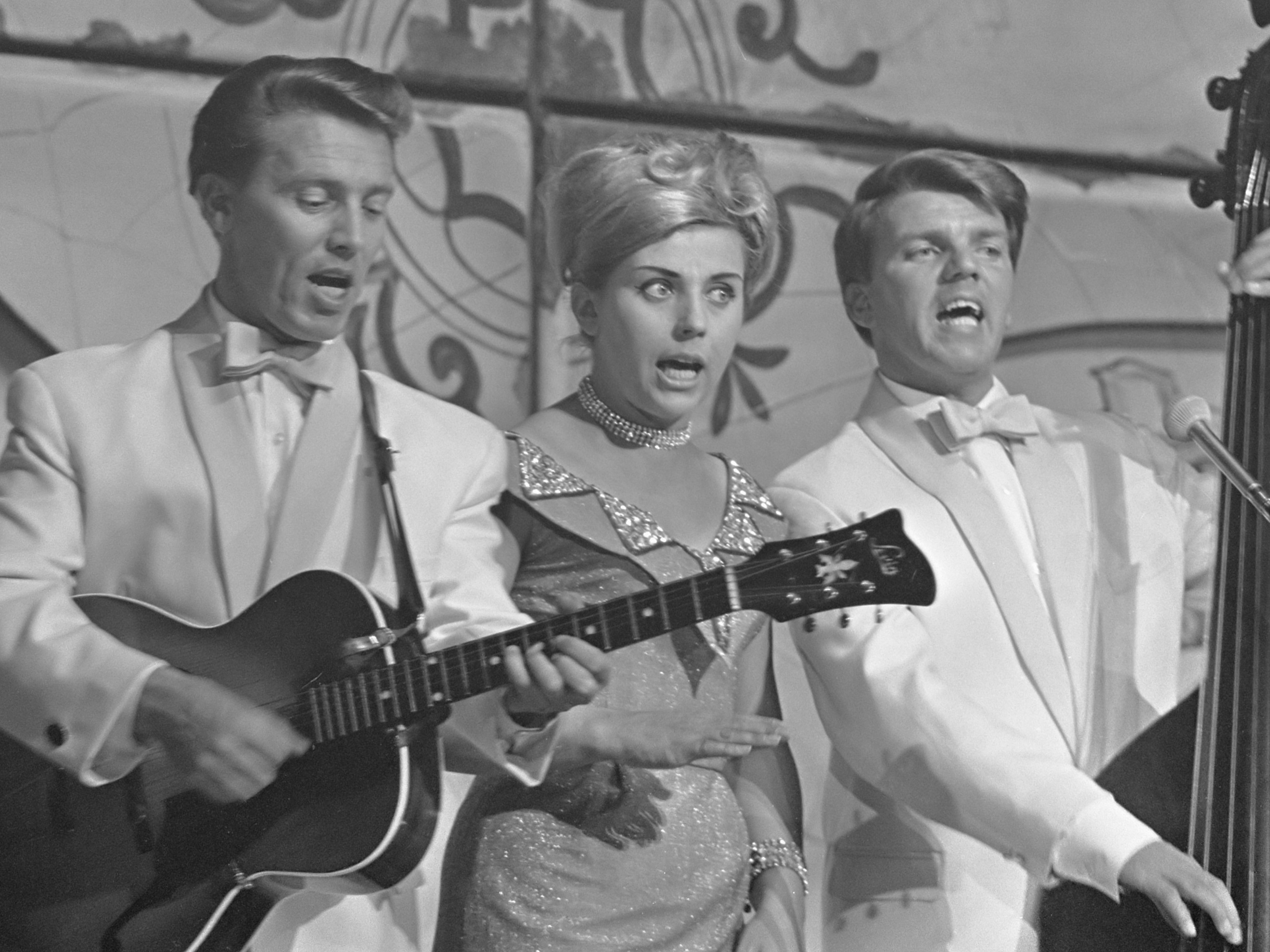 Snip en Snap revue gaat in premiere, The Shepherds 7 juli 1965